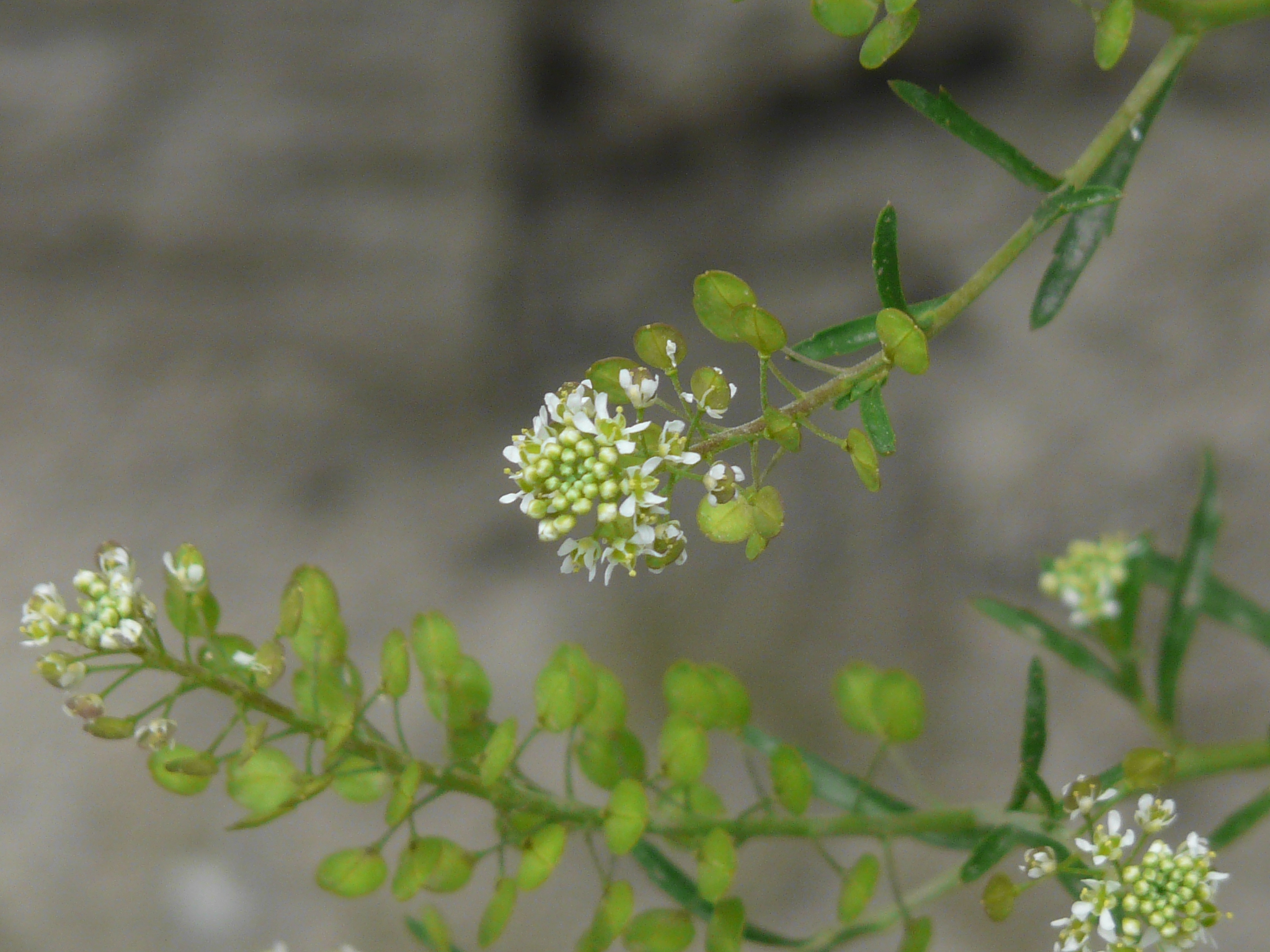 Lepidium sativum L.